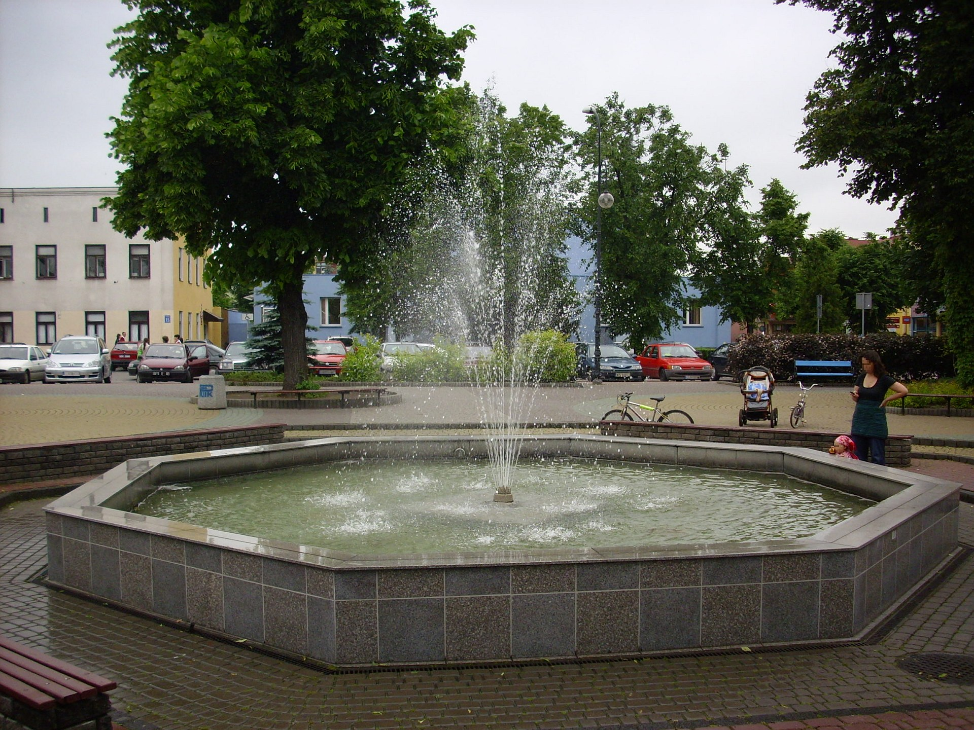 Łuków (woj. lubelskie, Polska). Fontanna na skwerze w centrum miasta.